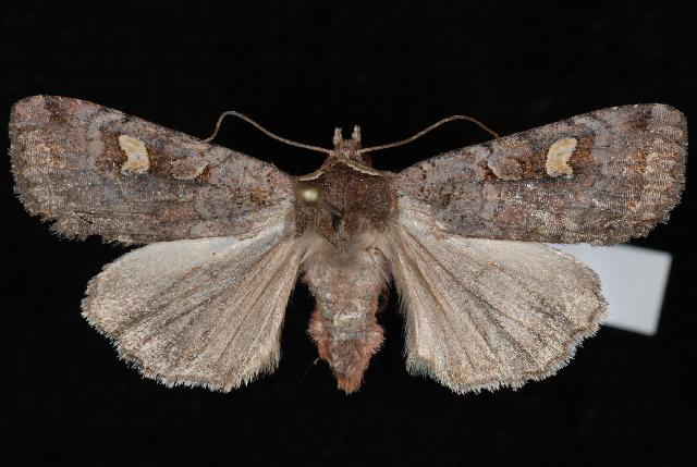 Adelphagrotis stellaris